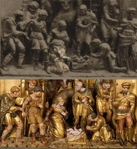 Adoration des Bergers de retable de Baume-les-Messieurs vers 1890 et état actuel